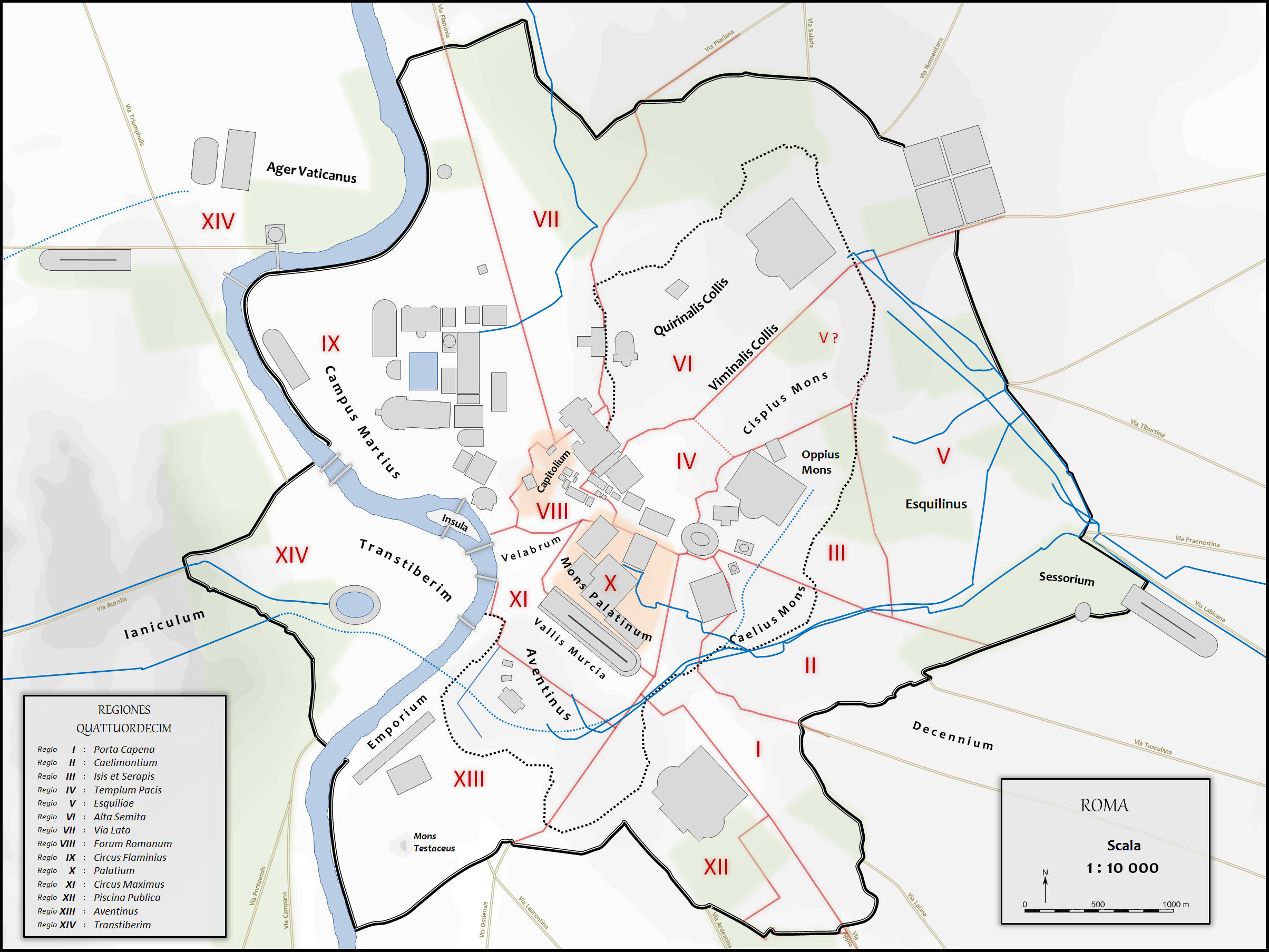 Plan intemporel de Rome antique.